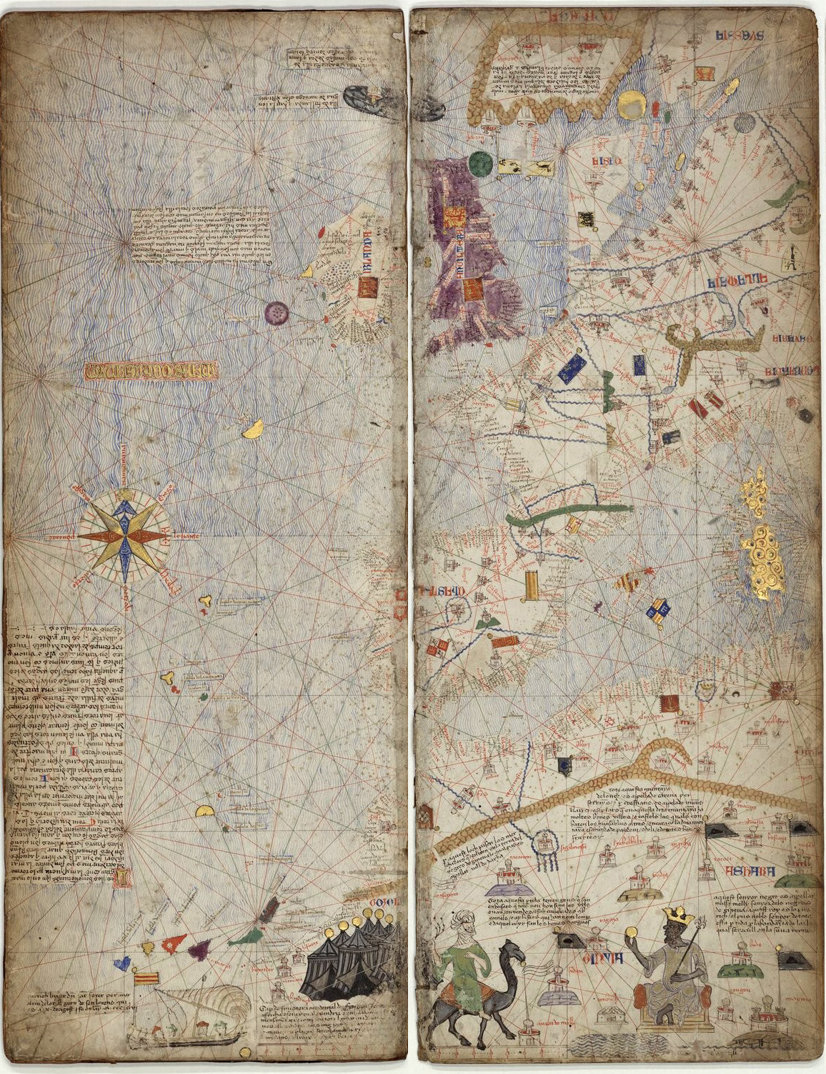 Full 3 de l'Atles Català de Biblioteca Nacional de França